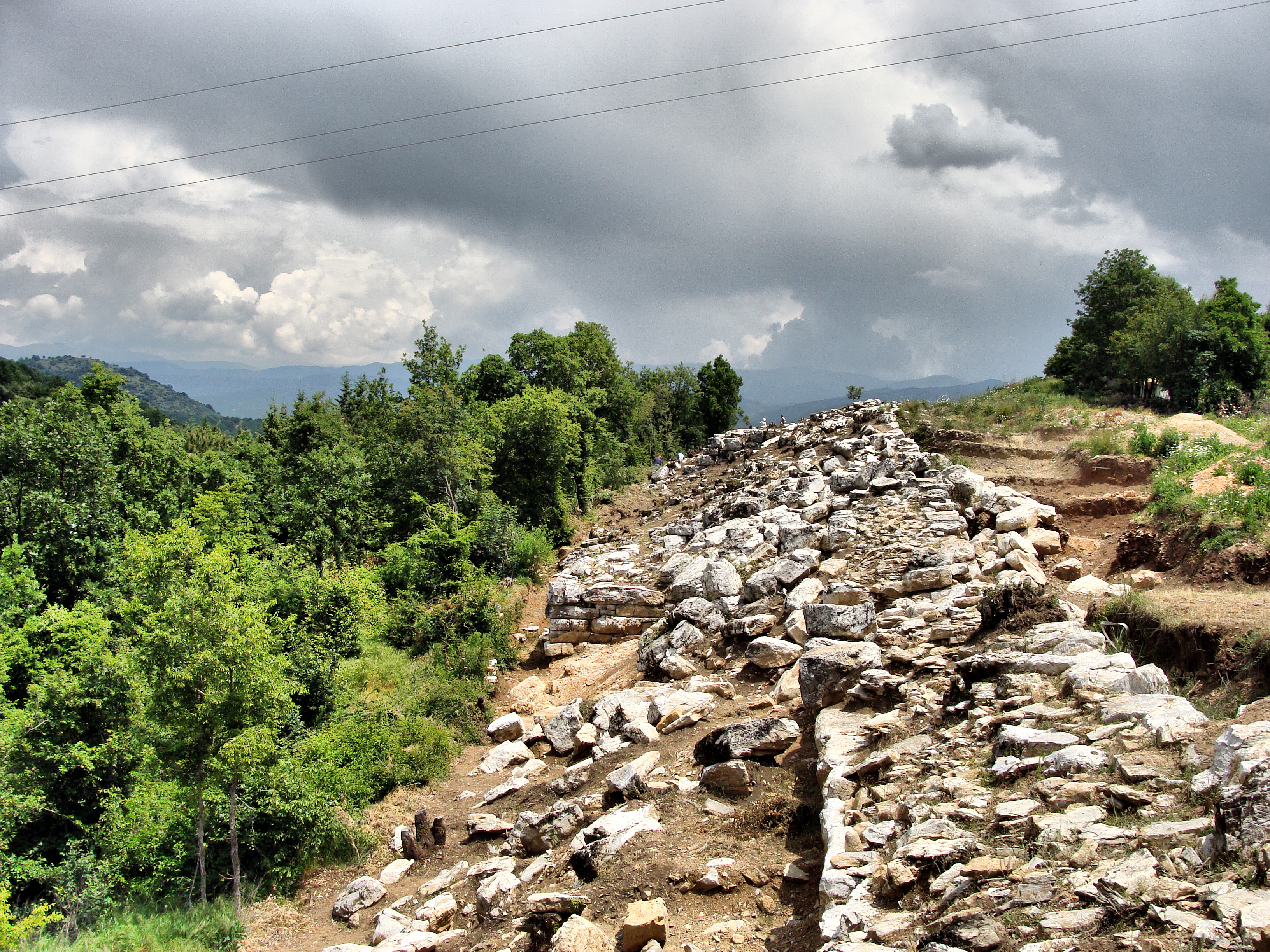 Археолошки локалитет Енгелана, во близина на Св. Еразмо, Охрид.